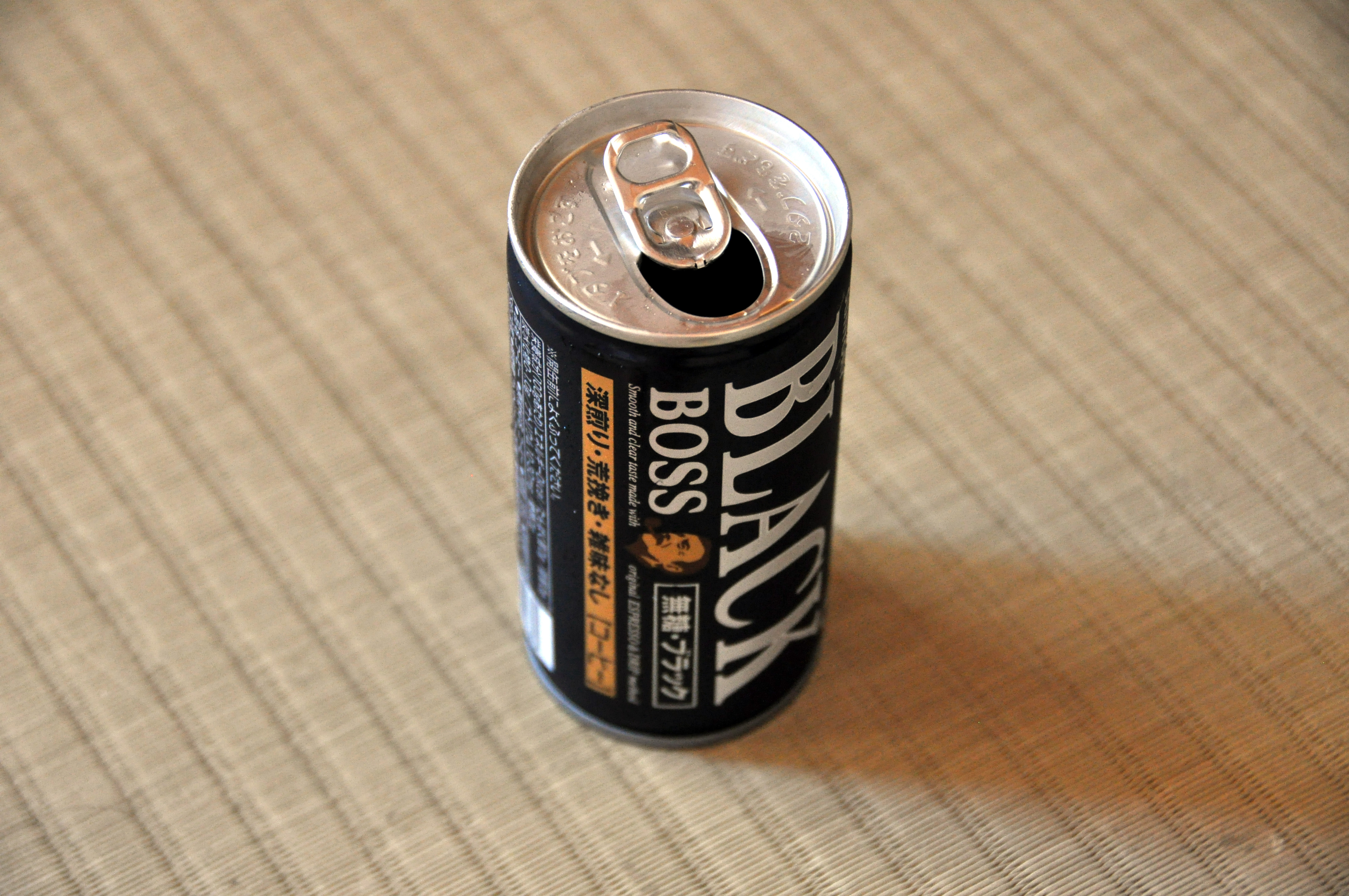 Kaffe